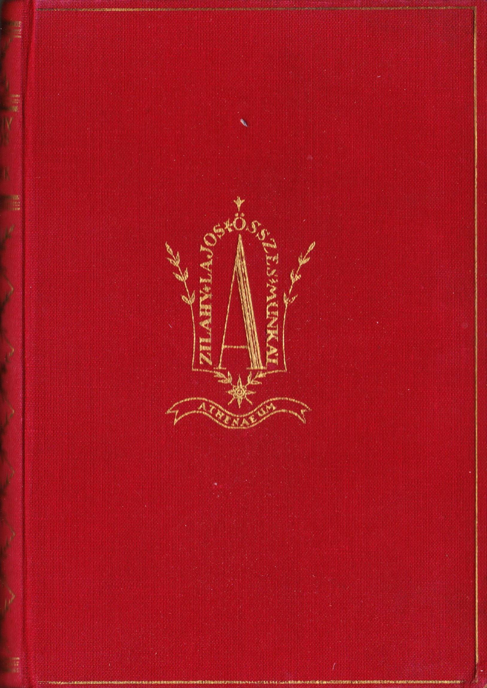 Zilahy Lajos munkái könyvborító 1930-as évek